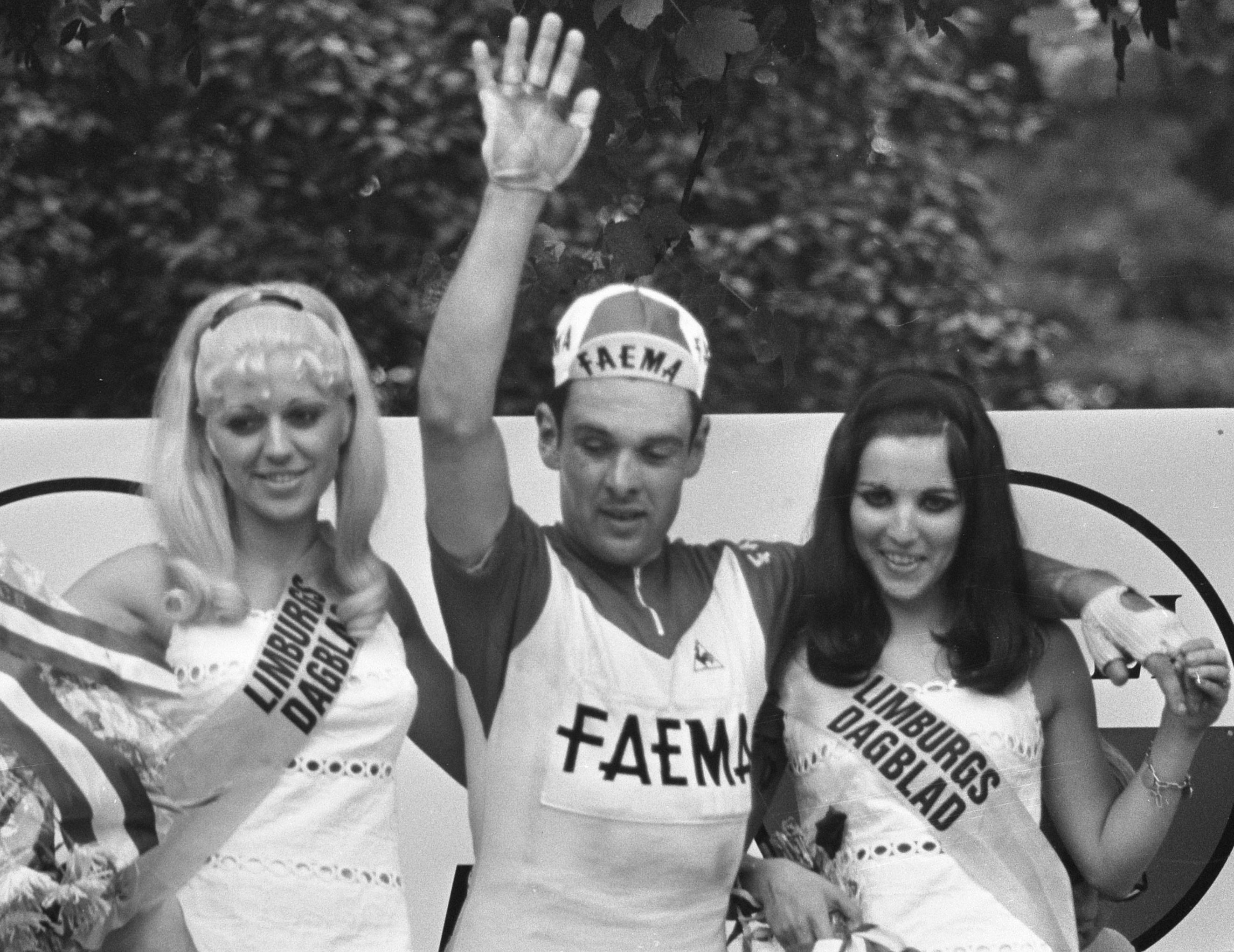 Tour de France 1969. Finish van de 2e etappe in Maastricht: de etappewinnaar, de Belg Julien Stevens tijdens de huldiging